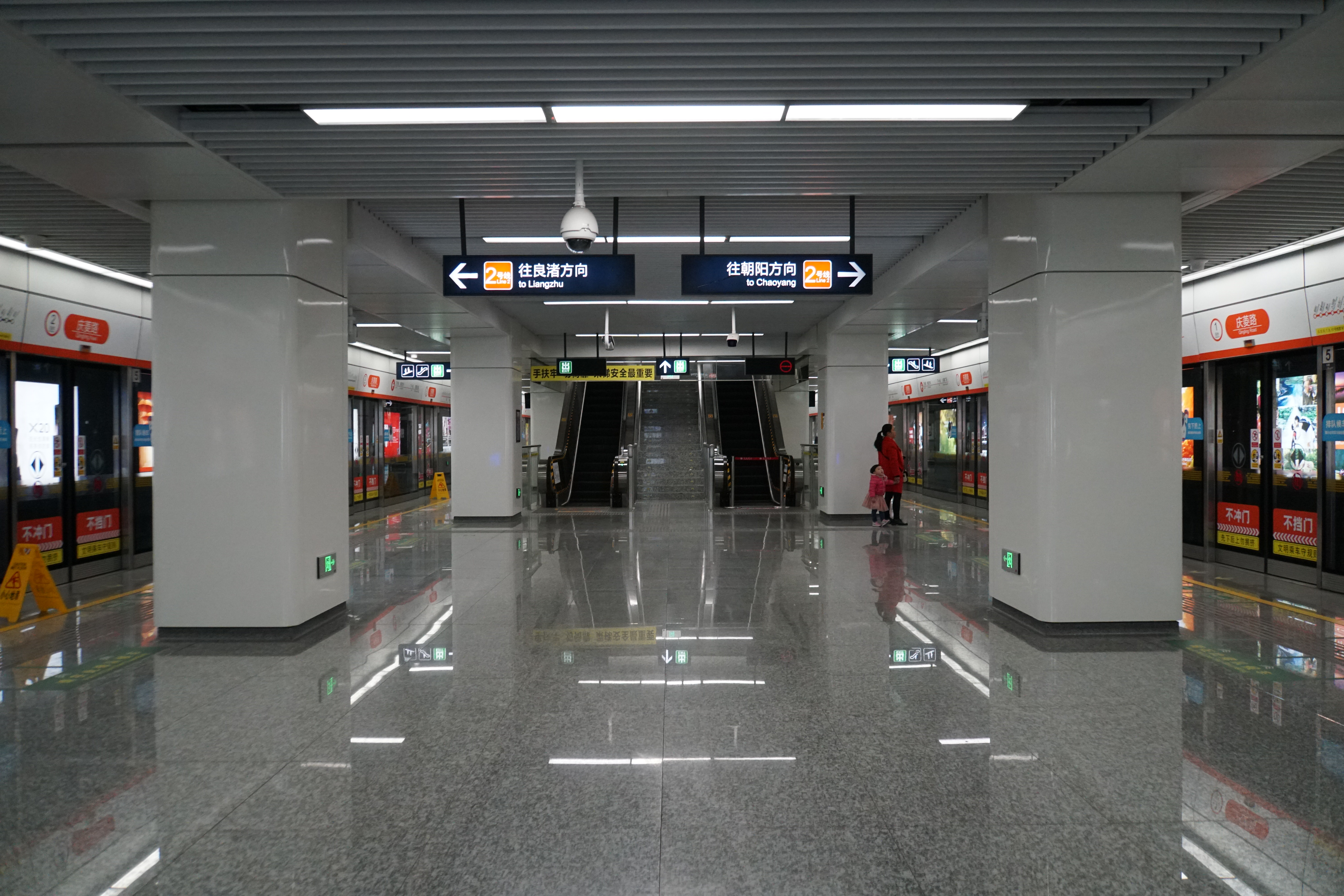 杭州地铁2号线庆菱路站台